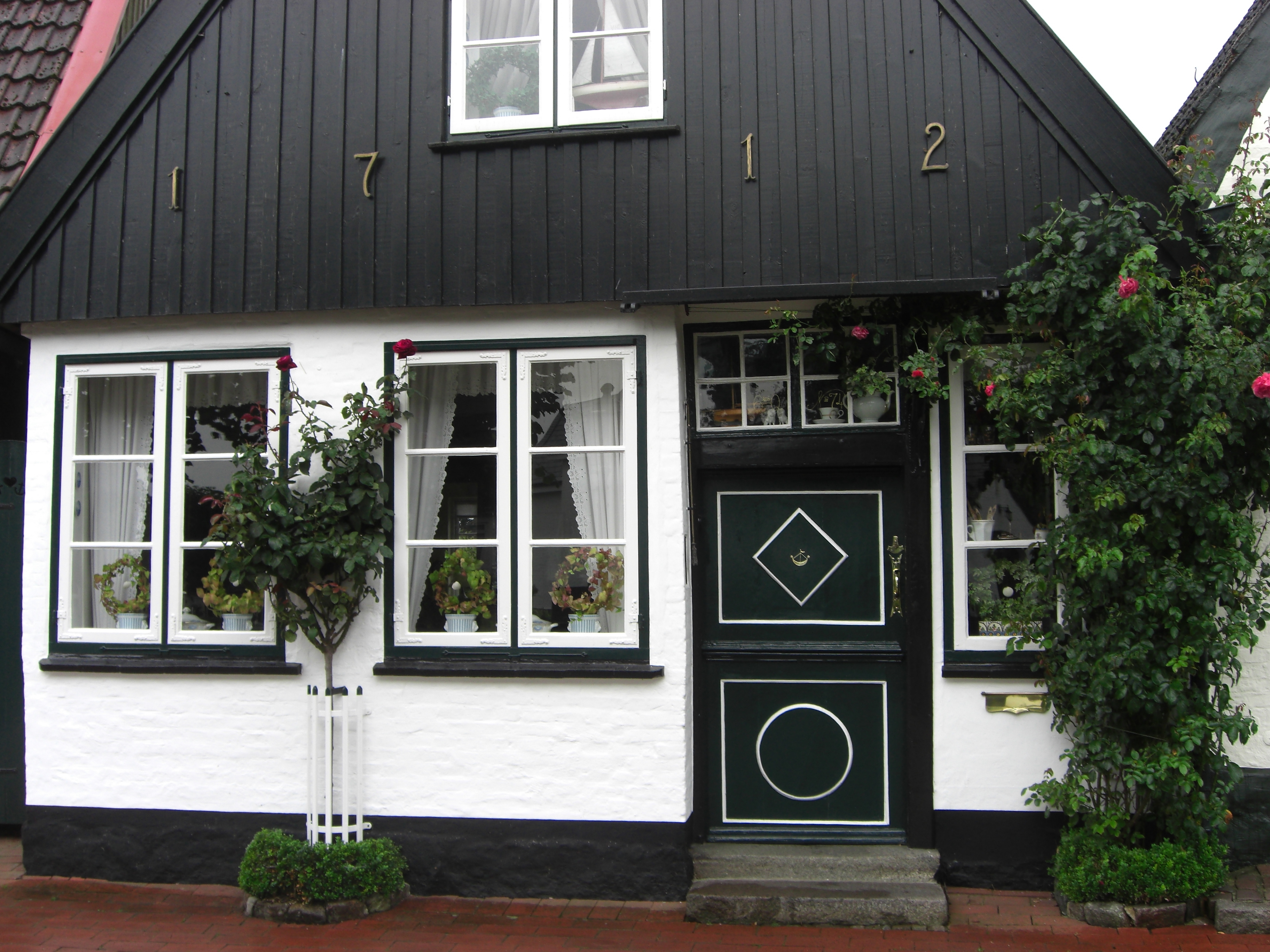 Haus in Holm bei Schleswig